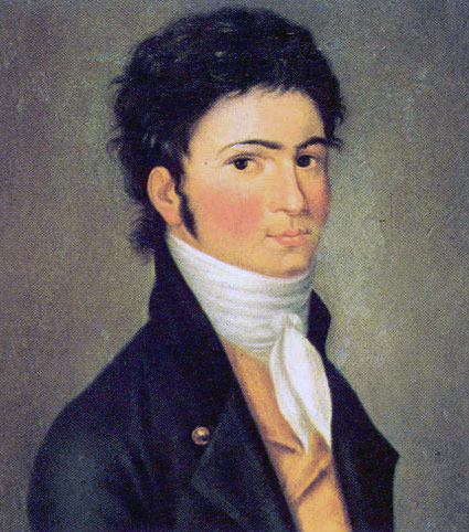 Portrait of Ludwig van Beethoven